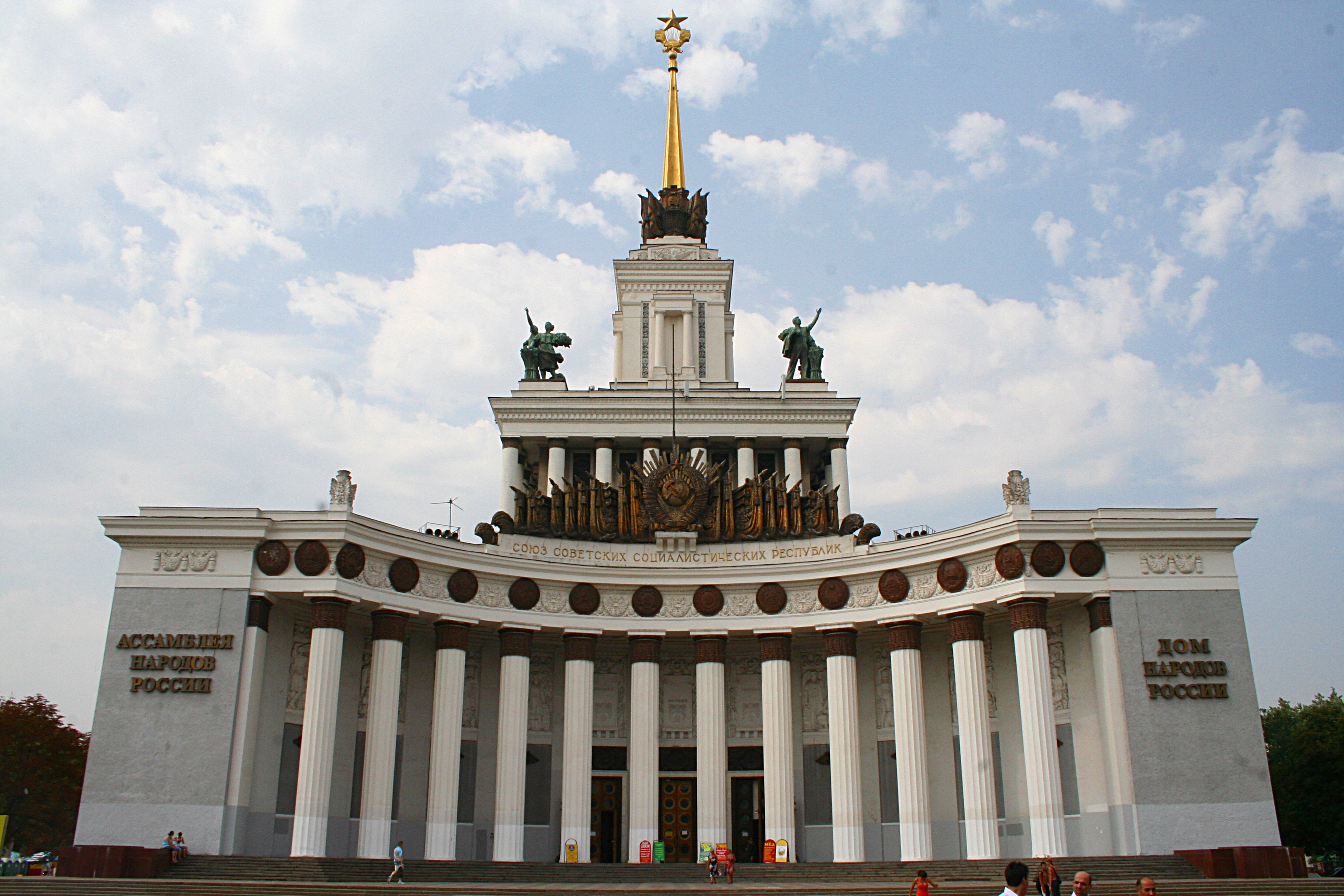 Главный павильон ВДНХ (ранее ВСХВ). Автор проекта Г. В. Шуко с группой архитекторов: Е.Столяров, С.Никулин, Р.Бегунец, П.Платонов, Р.Никитин. Павильон сооружён в августе 1954 года.